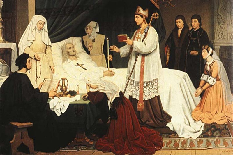 Sterfbed van Jan Glymes, Heer van Bergen op Zoom. Geschilderd door Gerard Leonardus van Genk voor het Markiezenhof.